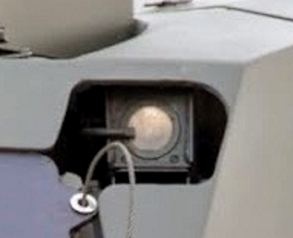 Линза из кристаллического Германии на обзорной ИК-камере на микроболометрической матрице танка Армата Т-14. Виден характерный блеск металлического Германия. Трубочка рядом с линзой - это система гидроочистки от пыли и грязи.